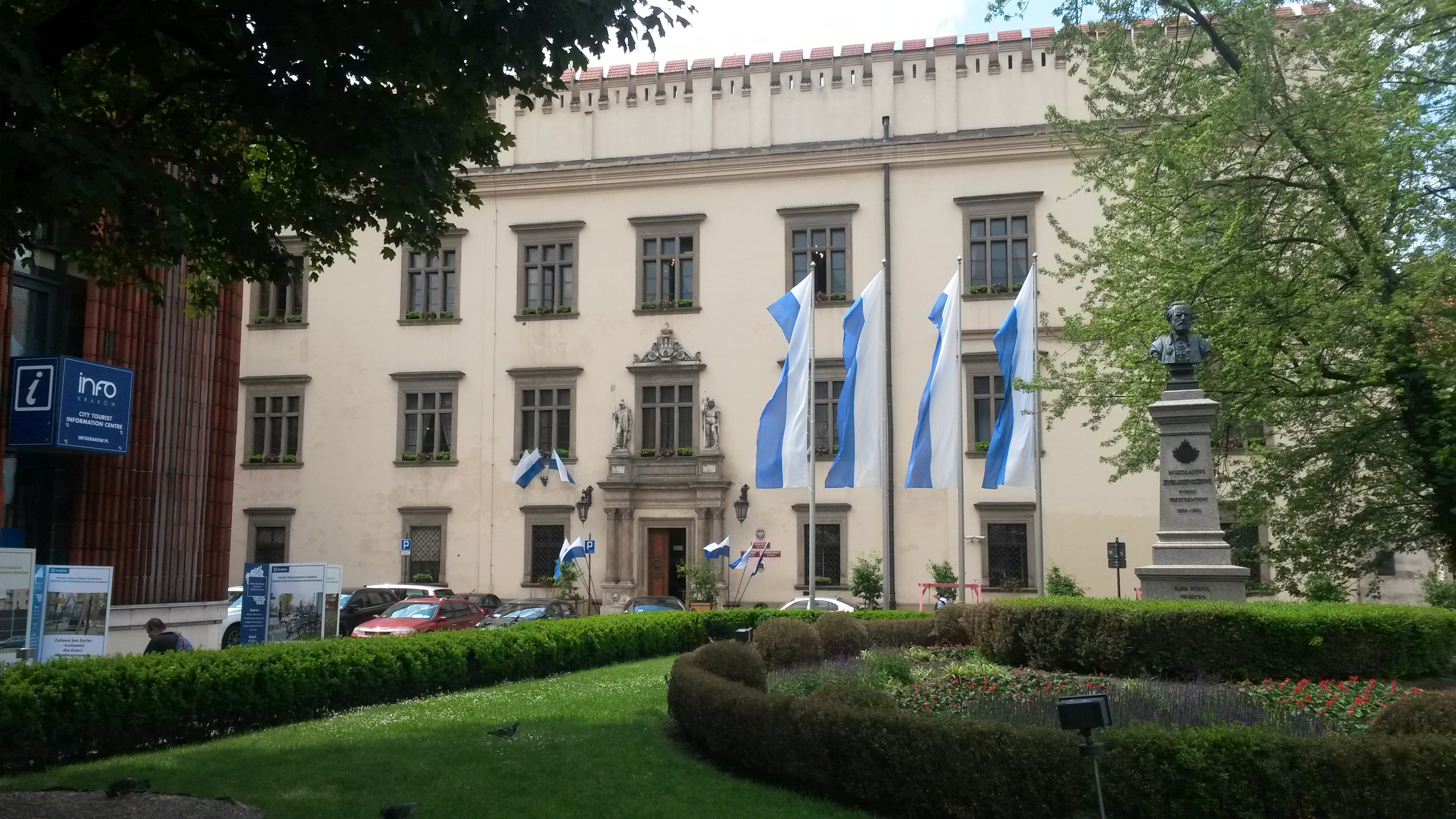 Magistrat Krakowski podczas uroczystej sesji Rady Miasta - Pałac Wielopolskich w Krakowie, 5 czerwca 2017 roku.